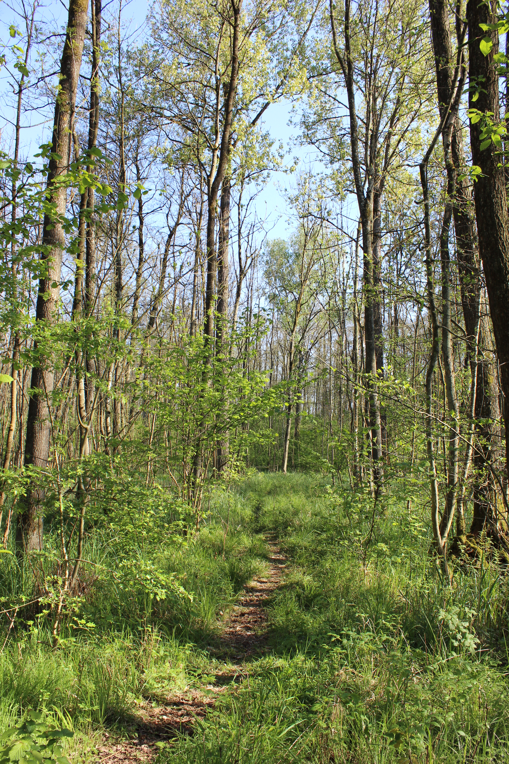 Der Rainer Wald im Landkreis Straubing Bogen gehört zum FFH-Gebiet "Wälder im Donautal". Das Gebiet erstreckt sich auch in den angrenzenden Landkreis Regensburg hinein.